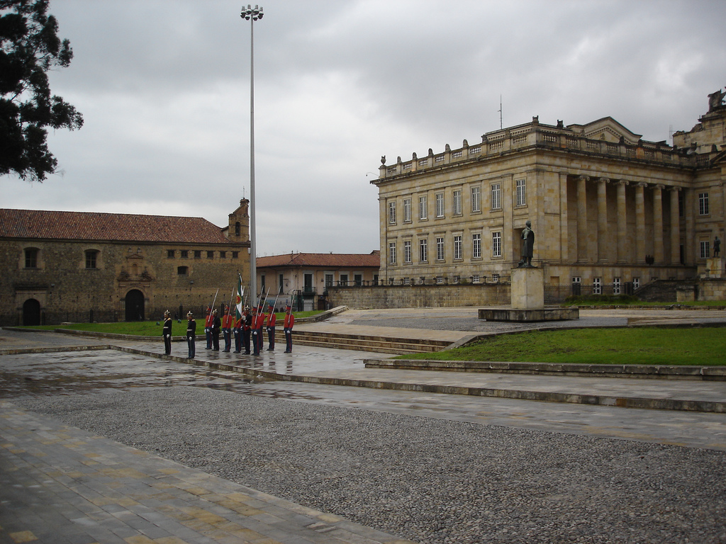 Patio frontal del Palacio de Nariño. Bogotá, Colombia